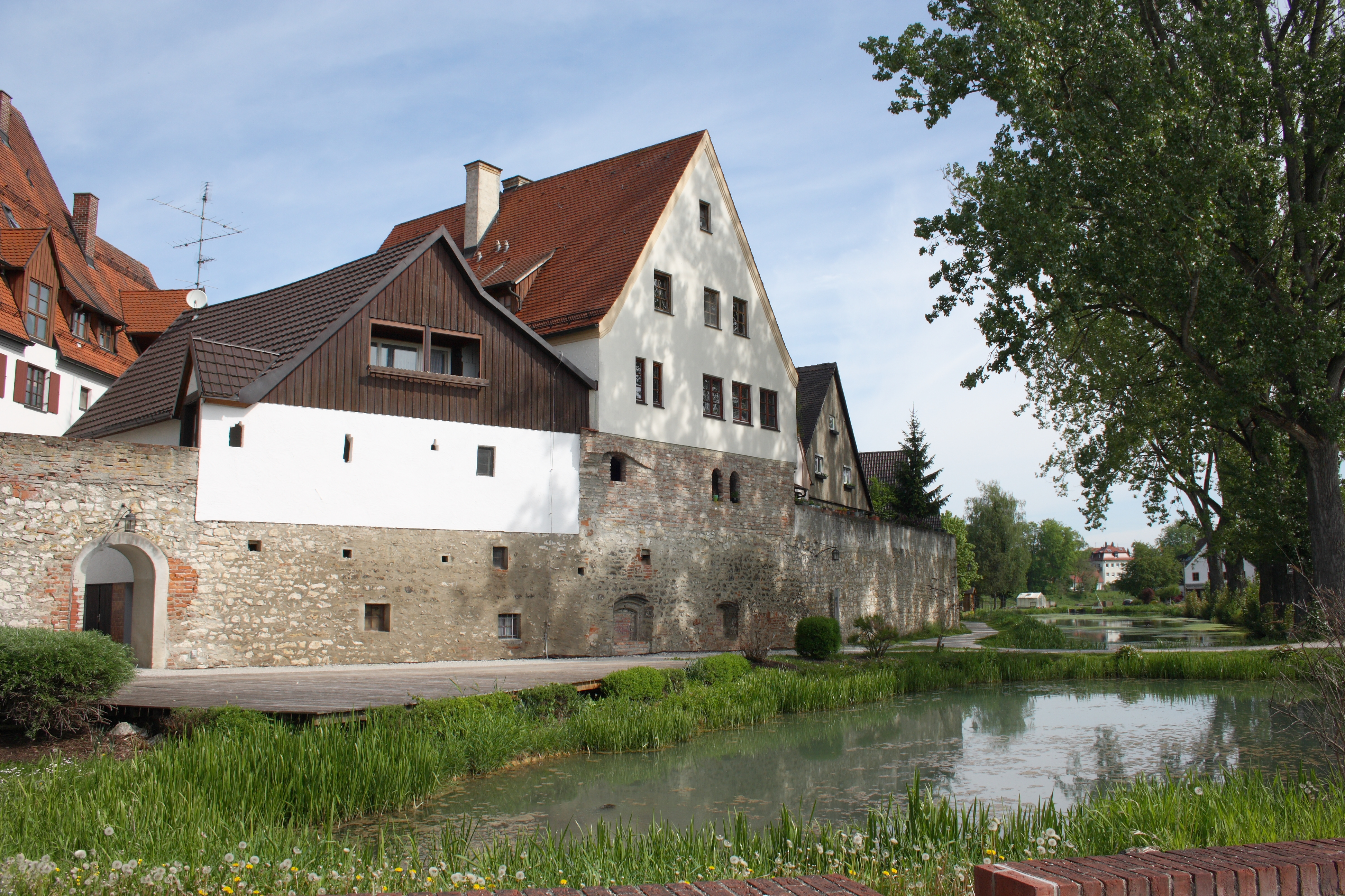 Stadtmauer in Lauingen im Landkreis Dillingen an der Donau (Bayern)